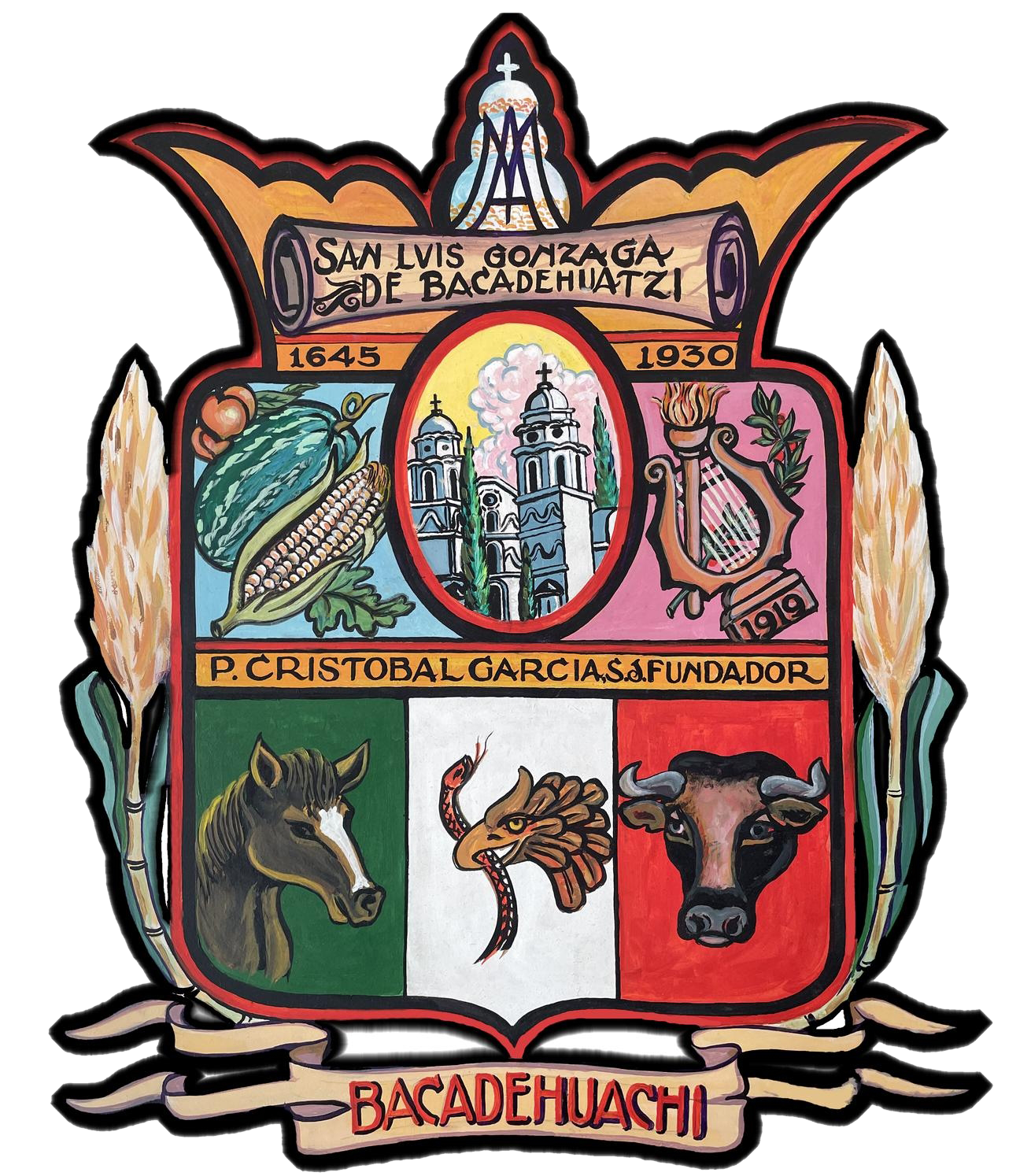 Escudo del municipio sonorense.